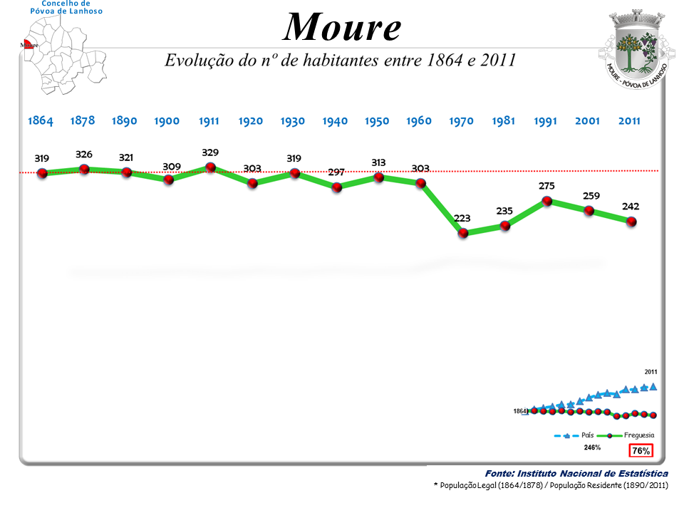 Censos 1864/2011